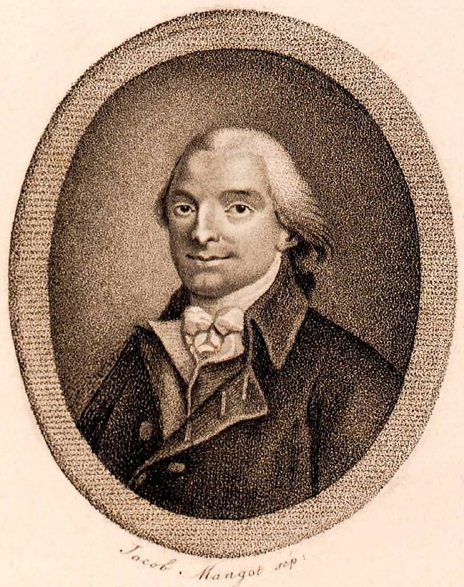 Portrait